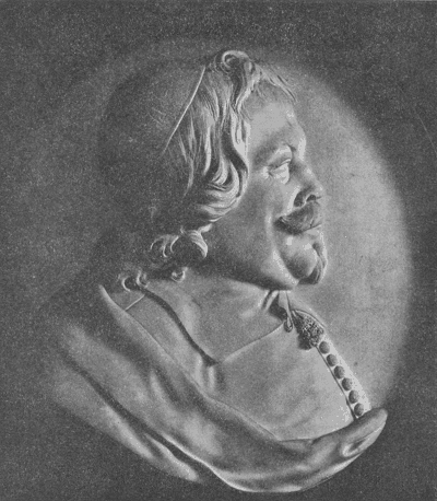 Cornelis de Graeff (1599-1664), vrijheer van Zuid-Polsbroek, burgemeester en regent van Amsterdam etc